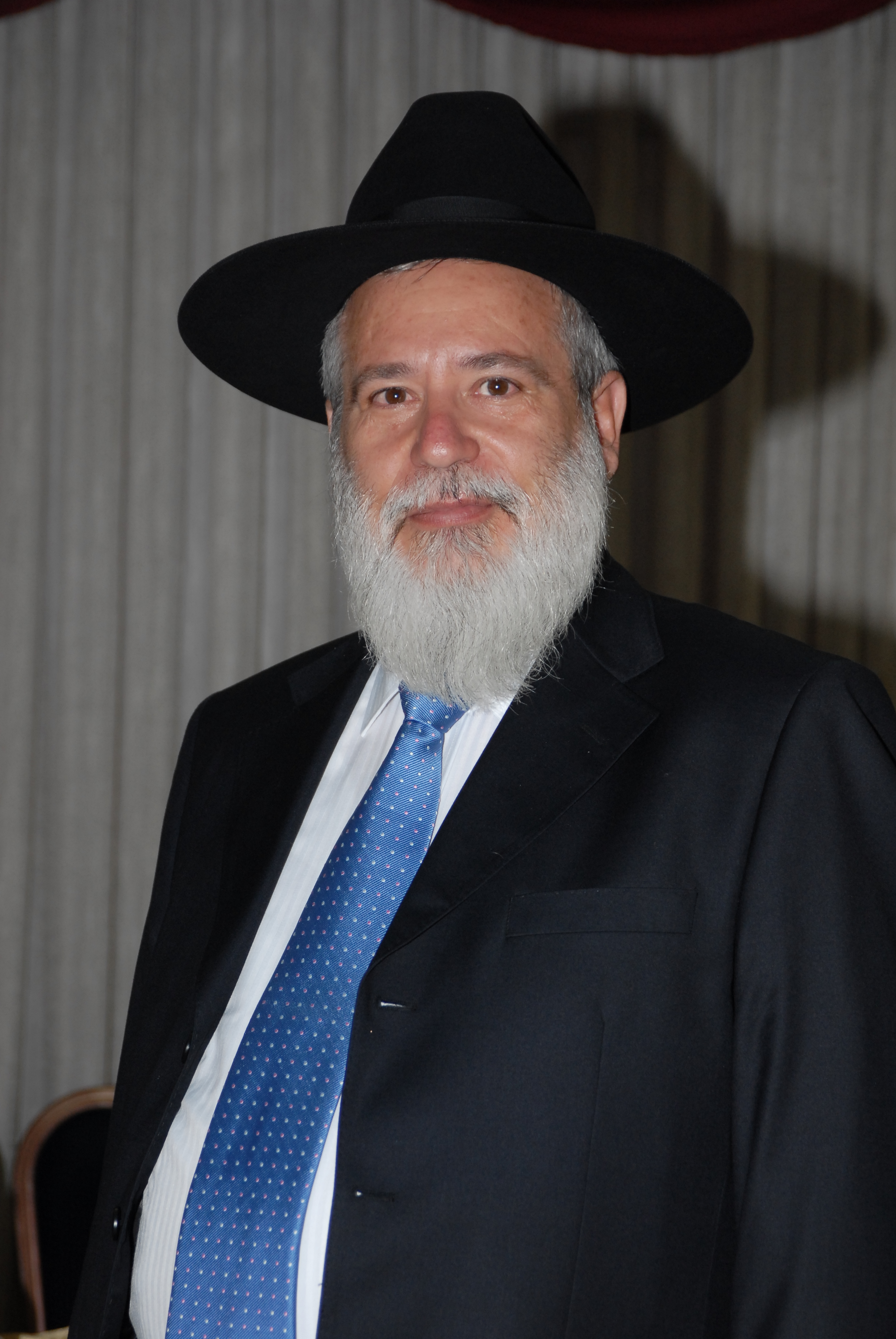 נסים דהן באירוע